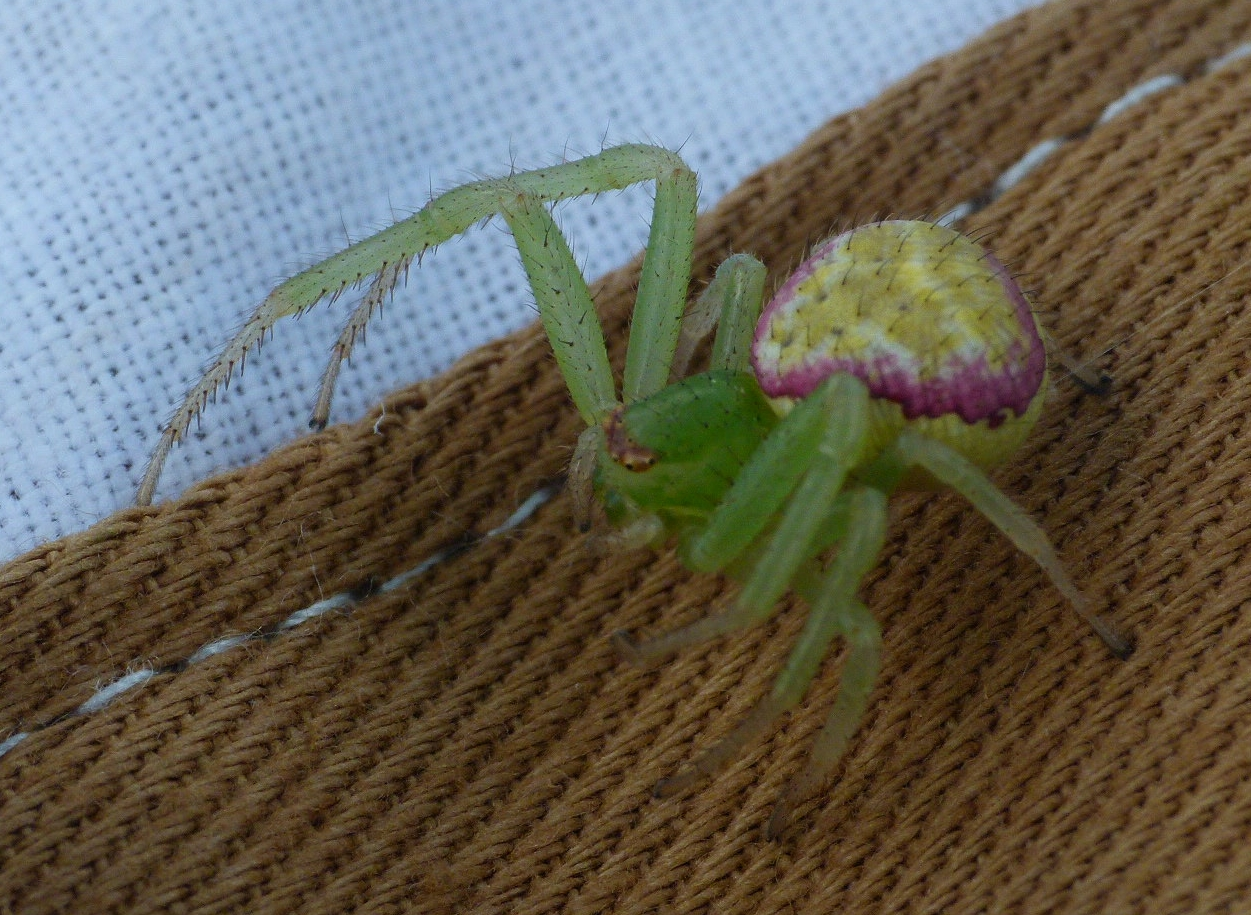 Heriaeus sp. Thomisidae, Mudigere, Karnataka